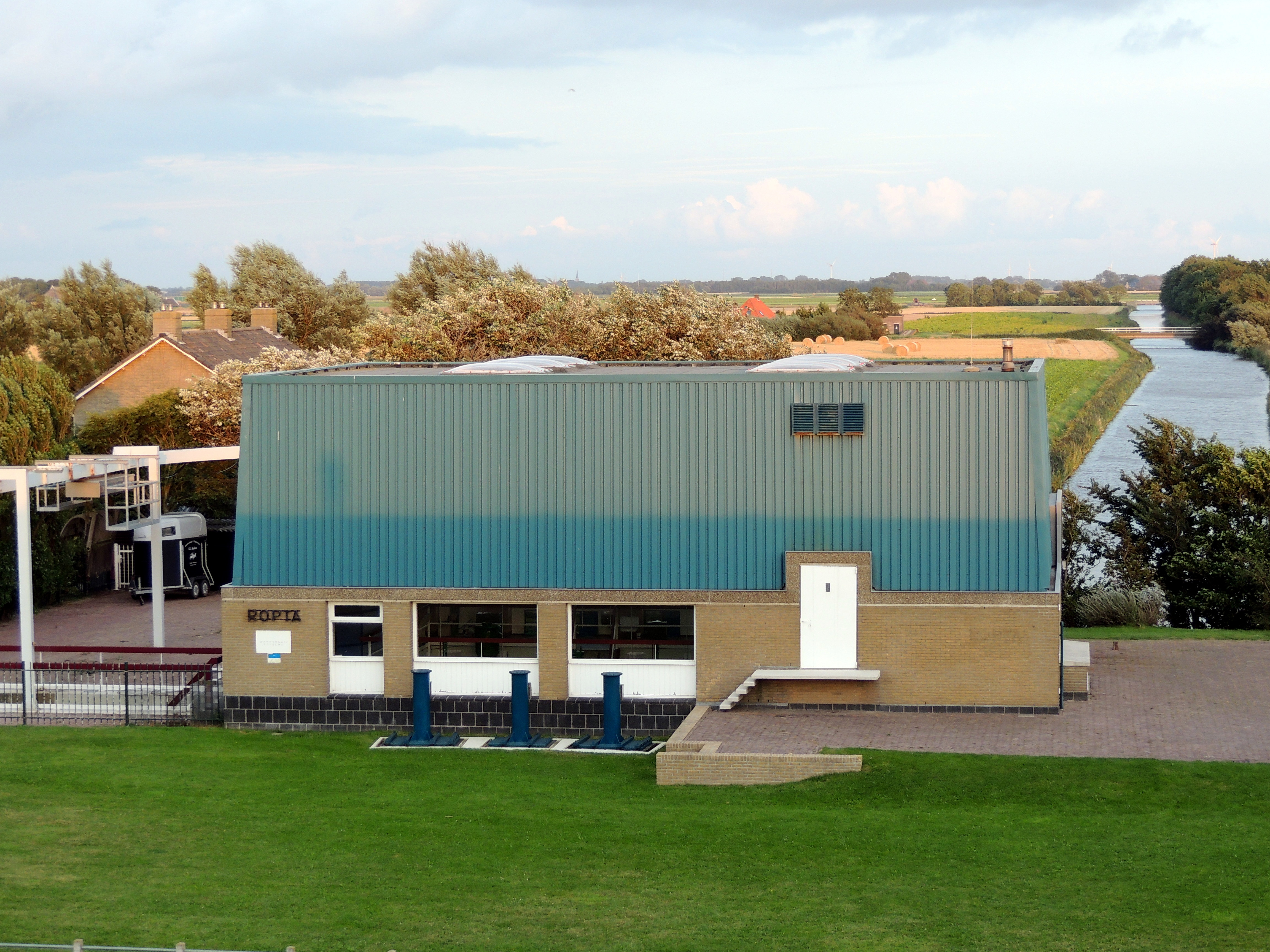 Het gemaal van Rotazijl